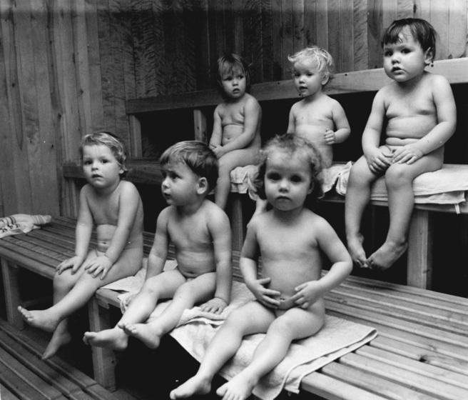 Klein Bünzow, Krippenkinder im Dampfbad ADN-ZB Bartocha 22.3.84 Hü Bez. Neubrandenburg: Kommunalwahlen-Bilanz-Zu den sozialen Einrichtungen, die in den vergangenen Jahren in der Gemeinde Klein Bünzow, Kreis Anklam, neu entstanden sind, gehört auch die Sauna. Wöchentlich einmal können es sich die Krippenkinder beim Dampfbad wohlsein lassen. - siehe dazu auch die Fotos 1984-0322-14,15,17,13 u. 19 N